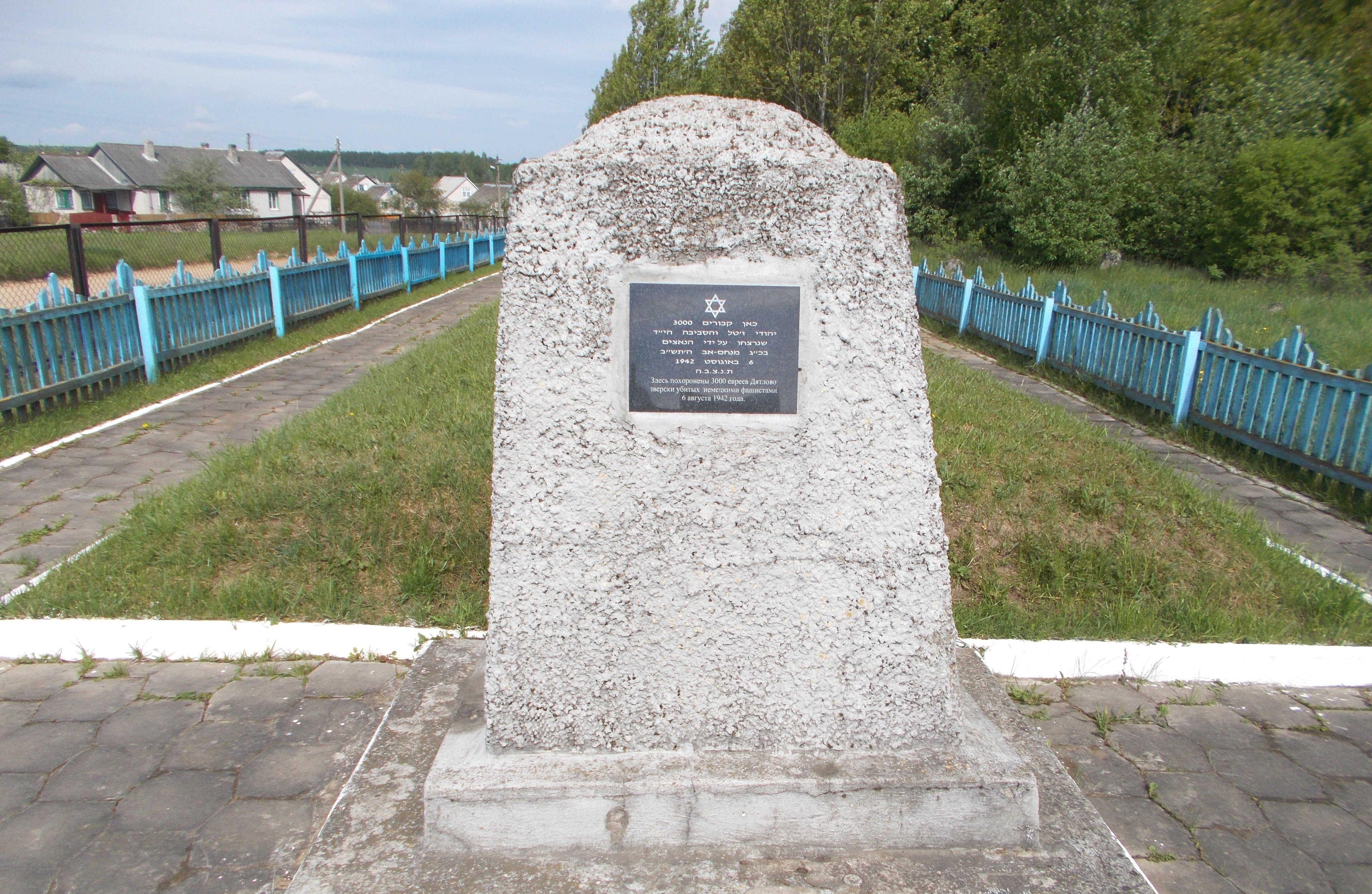 Еврейское кладбище в Дятлово (Гродненская область). Находится между улицами Октябрьская, Гагарина и Булата. На этом кладбище стоят памятники 3000 евреям Дятлово, убитым на этом месте 6 августа 1942 года, 54 евреям из деревни Дворец, убитым нацистами в 1942 году и похороненным здесь, а также место захоронения праха еврея-партизана Ескеля Атласа.